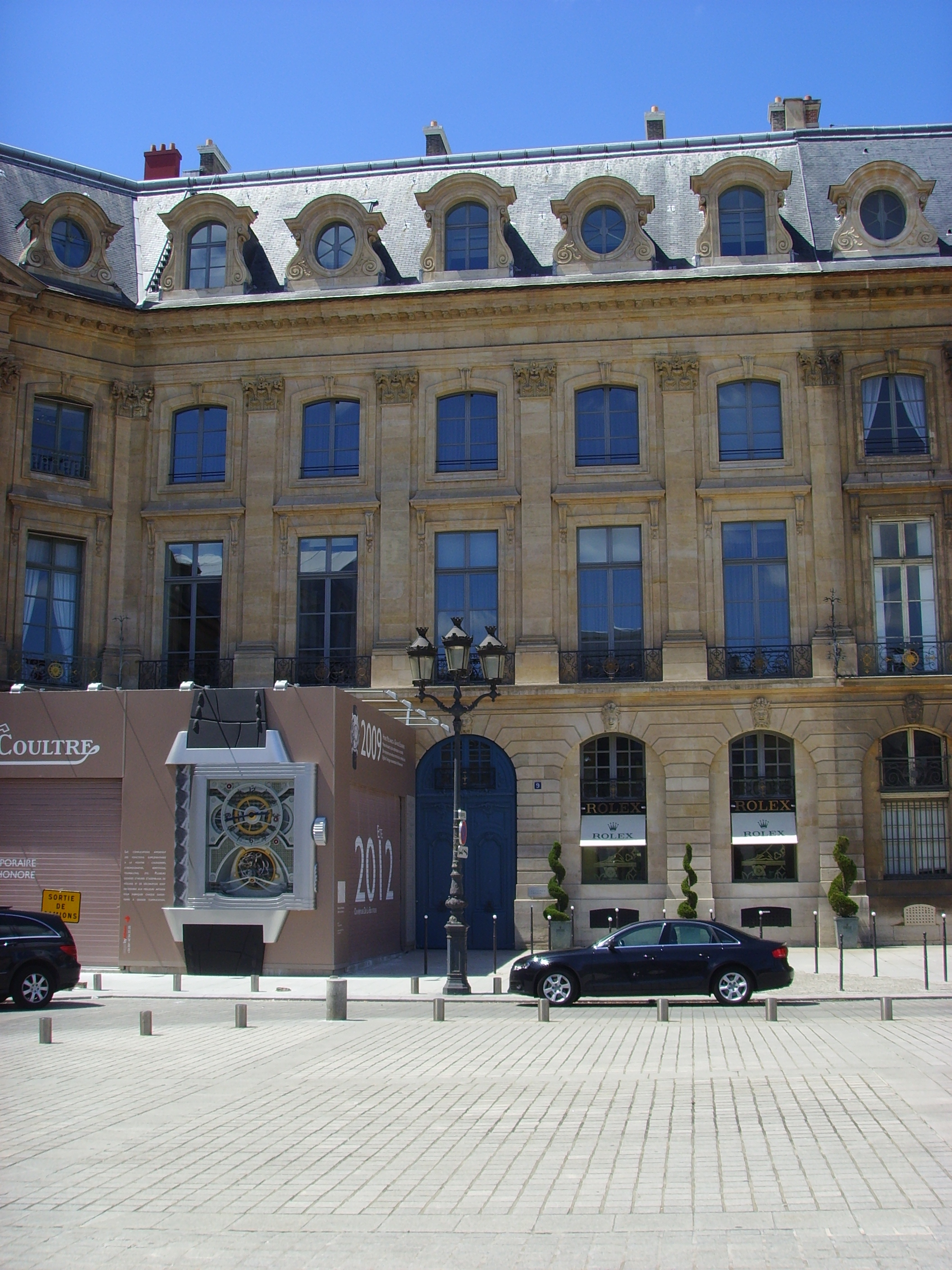 Façade de l'hôtel de Villemaré donnant sur la place Vendôme.